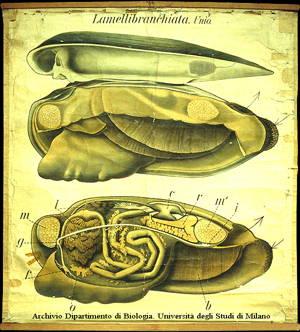 Unio pictorum - Mollusca, Lamellibranchiata